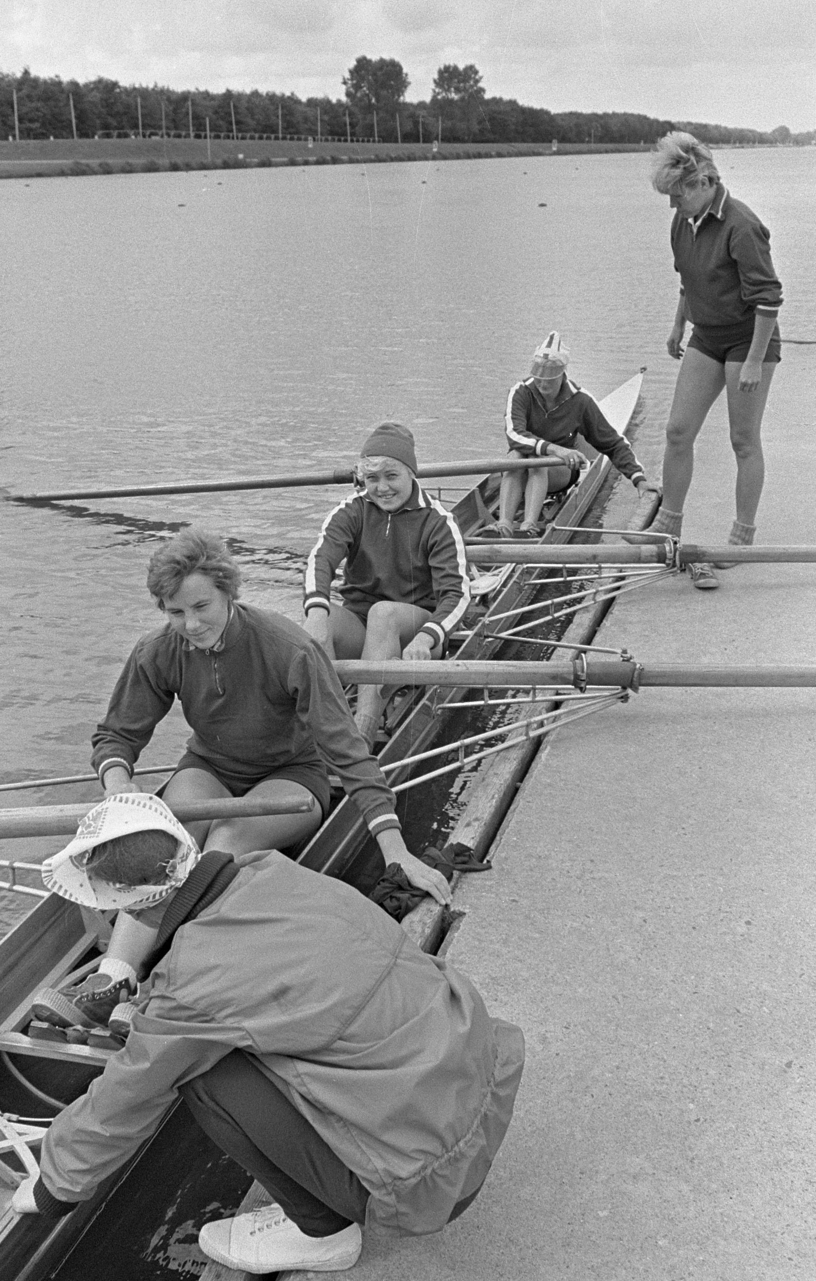 Europese Roeikampioenschappen, dames, Russische dubbel vier met stuurvrouw